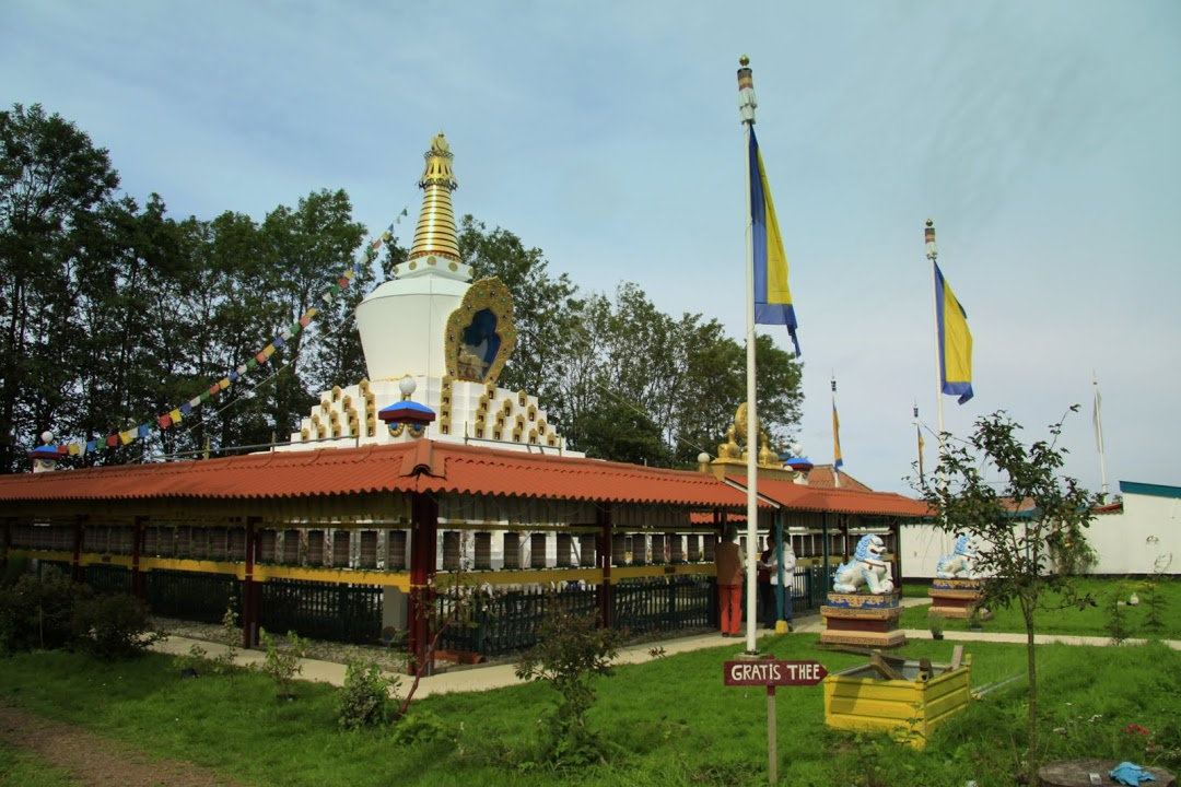 Aan de Stoepawei in Hantum staat de Boeddhistische Stoepa te pronken in het vlakke Friese Landschap. Heel bijzonder. Locatie bij benadering.